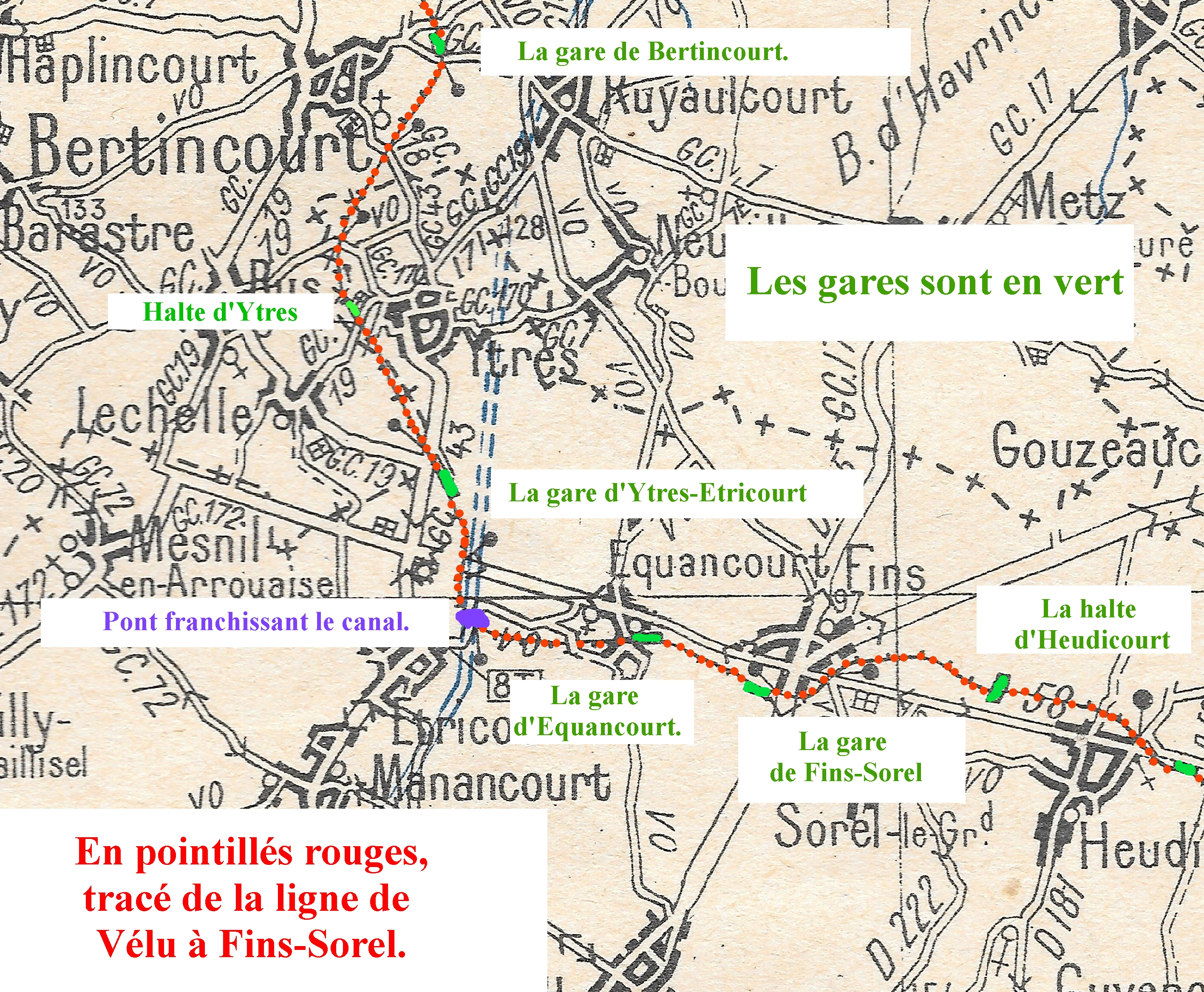 Carte du Vélu vers 1910.